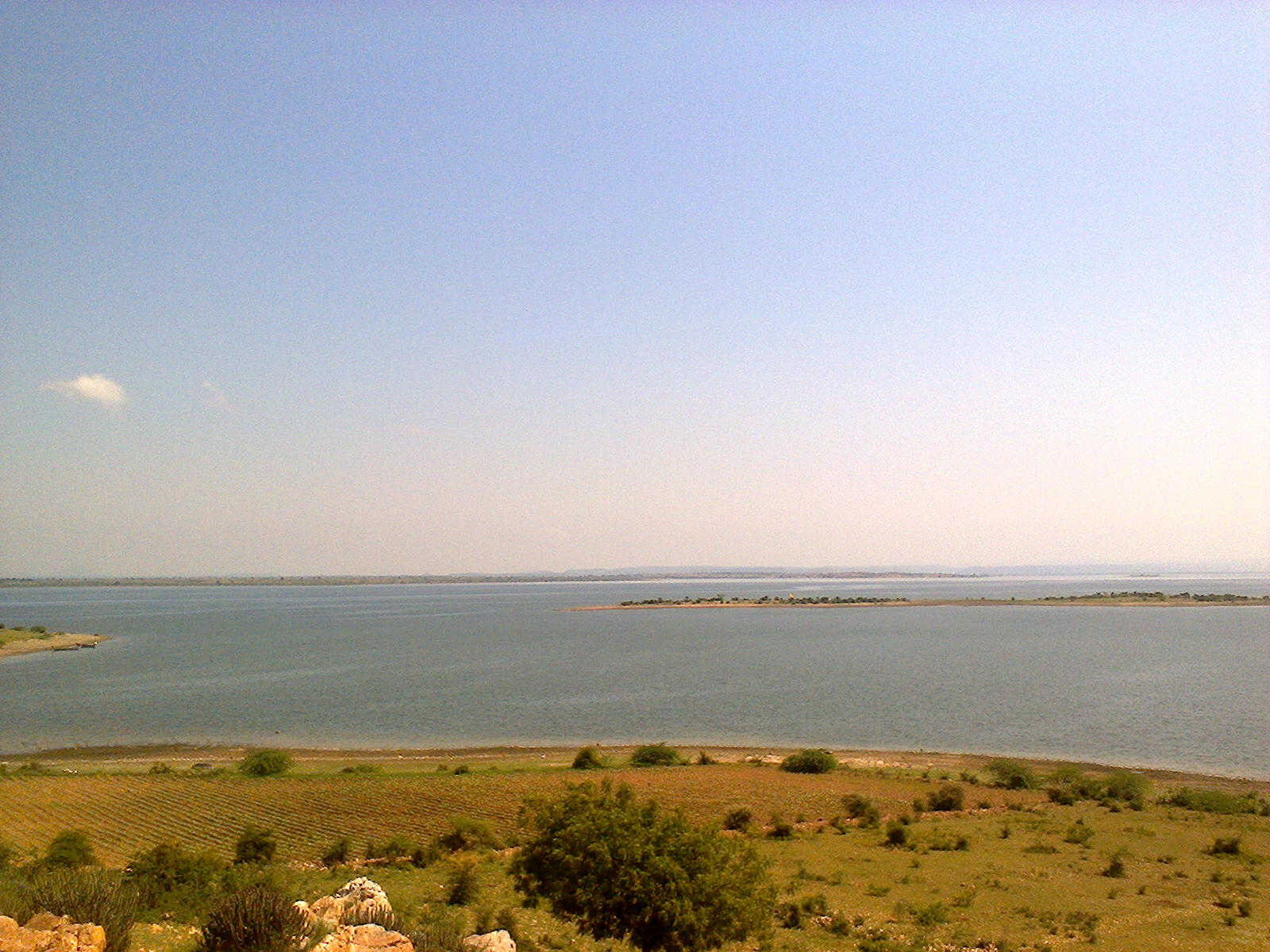 గొందిమళ్ళ సమీపంలో కృష్ణా, తుంగభద్రల సంగమ దృశ్యం